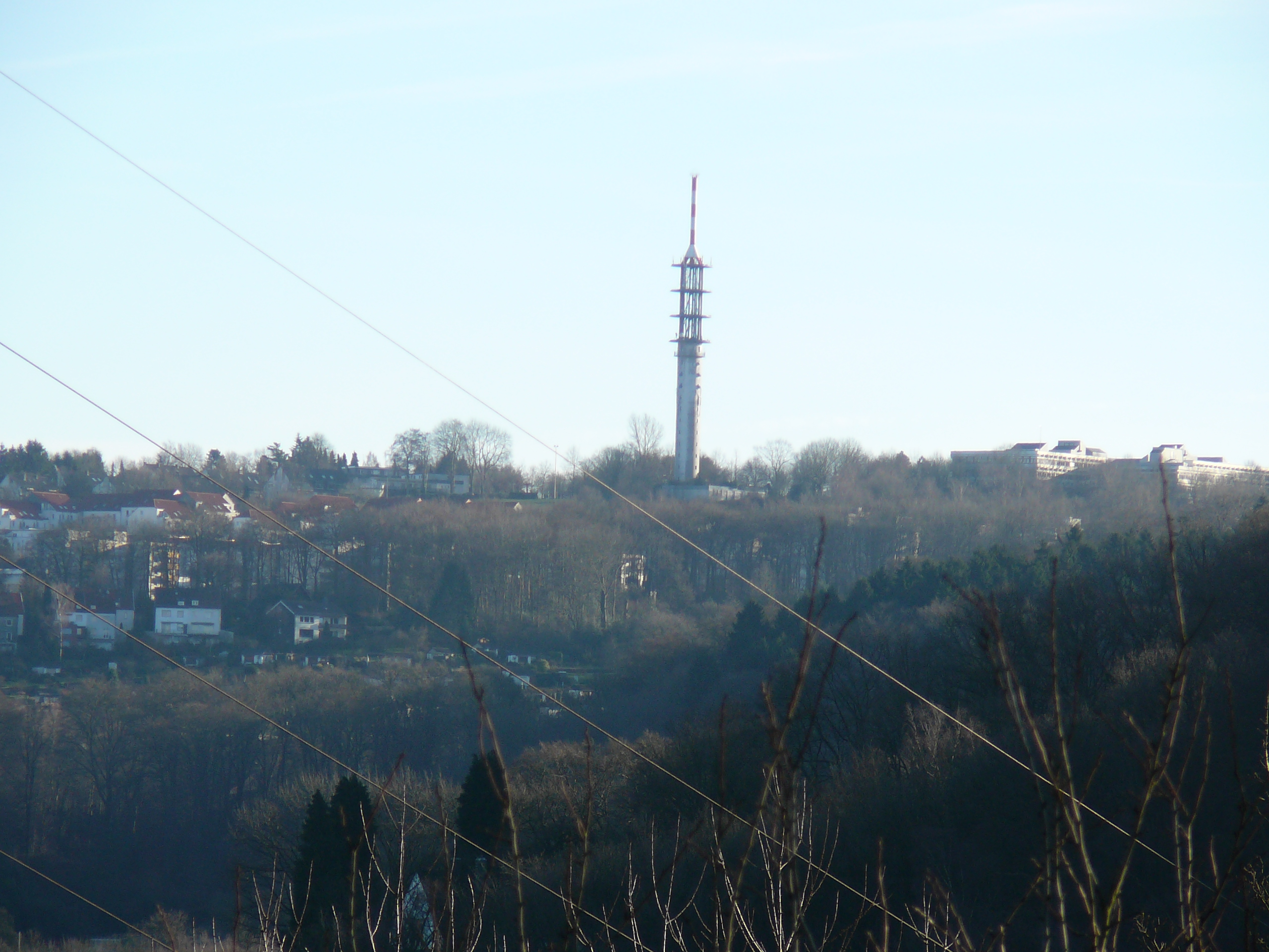 Fernmeldeturm Wuppertal-Küllenhahn, gesehen von Kyffhäuserstr, Wuppertal